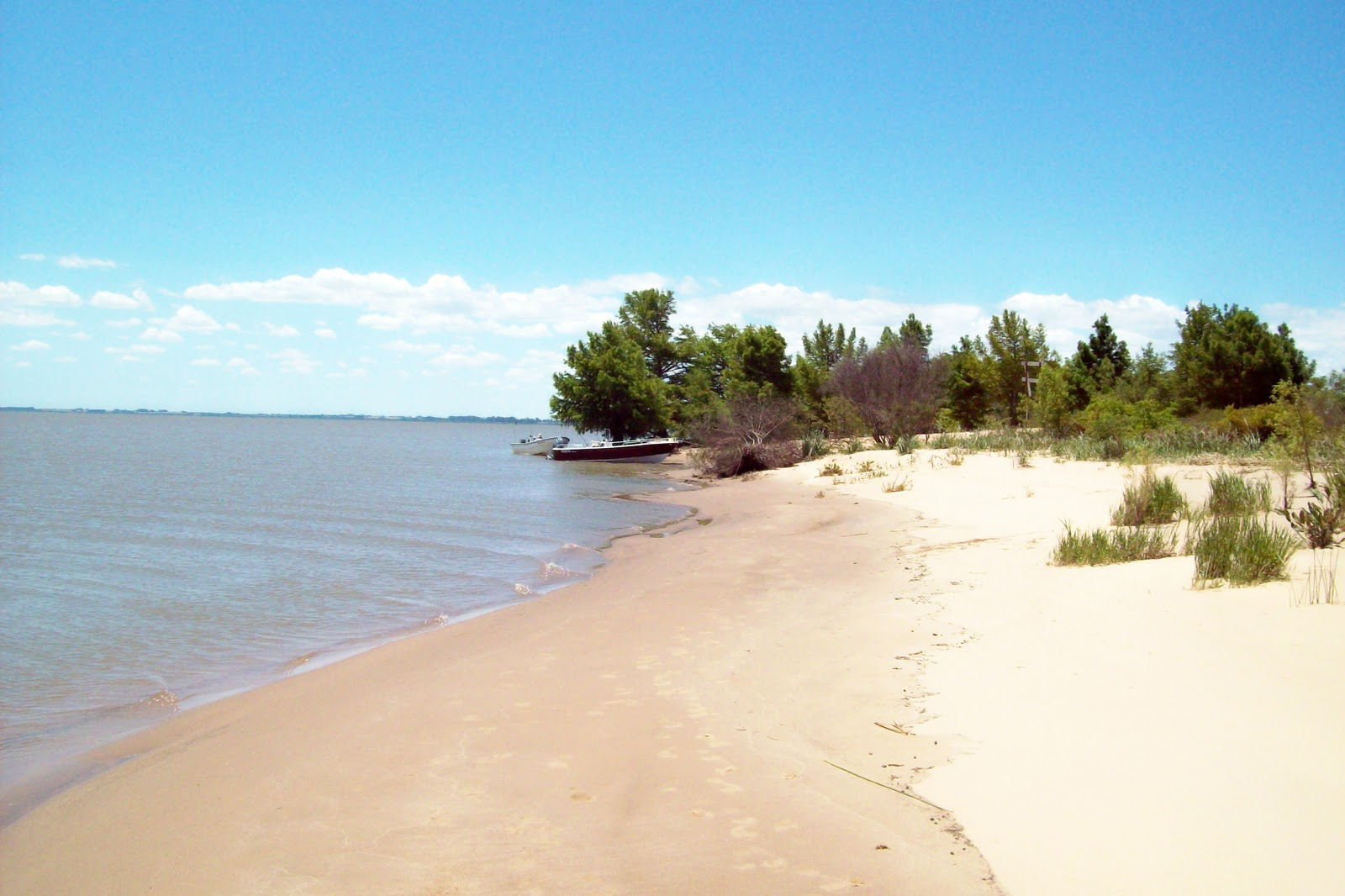 Vista de la playa. Isla Martín García (Argentina).